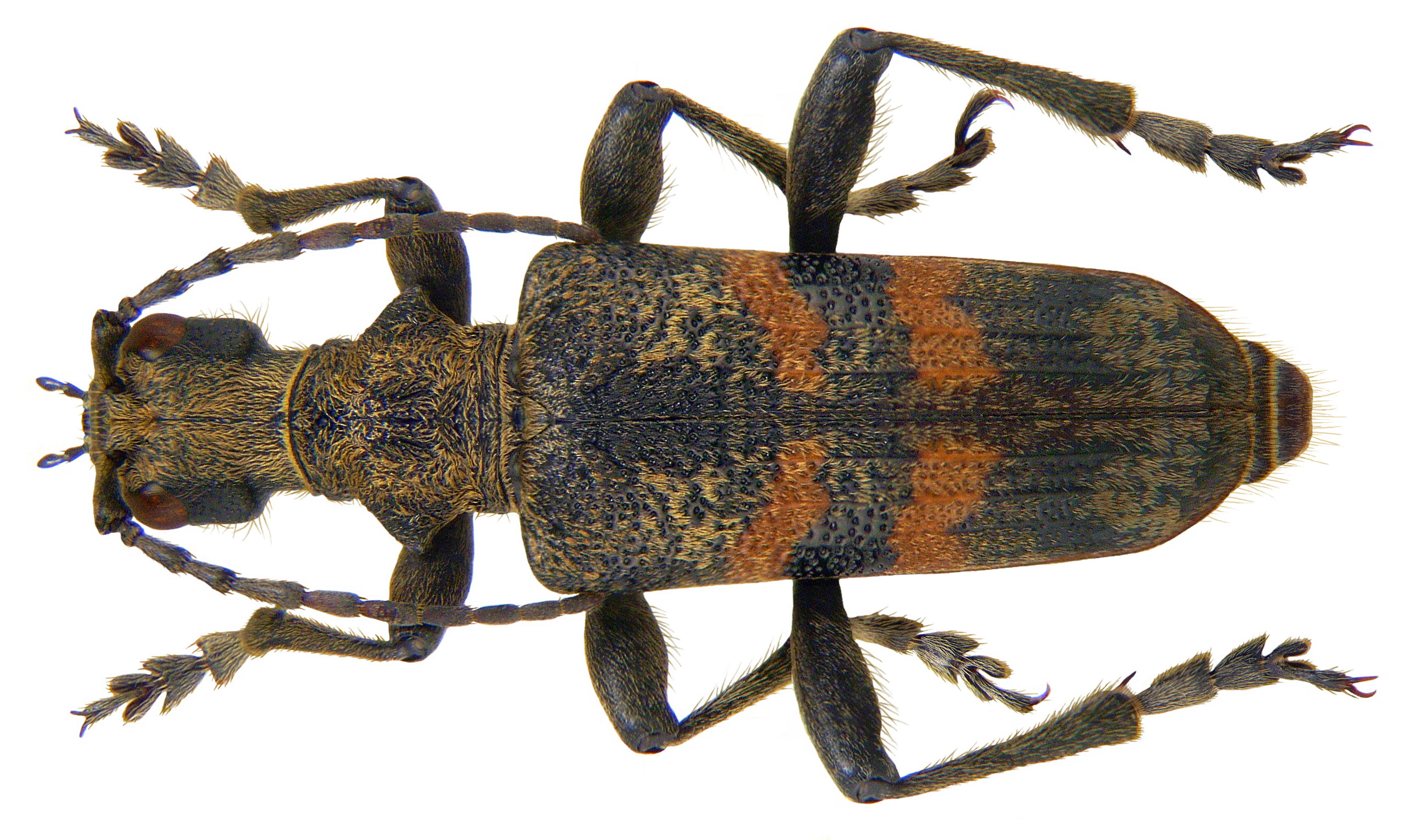 Familie: Cerambycidae Grösse: 13-22 mm Verbreitung: Europa Ökologie: Entwicklung in Laubhölzern, selten in Nadelbäumen Fundort: Germania, Bayern, Oberfranken, Kasendorf leg. det. U.Schmidt, 1981 Foto: U.Schmidt, 2005